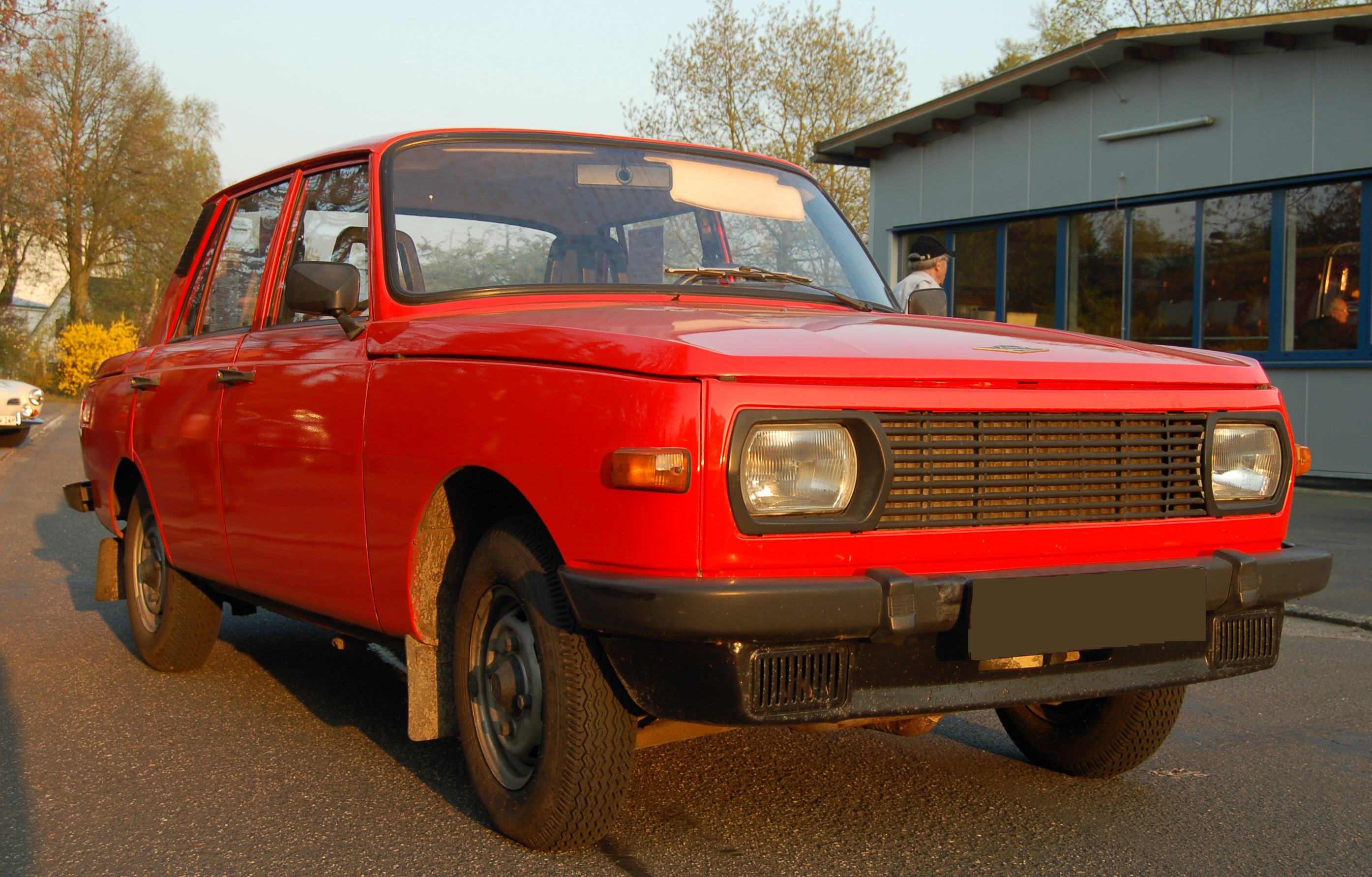 Wartburg 353 W in Rot beim Oldtimertreffen in Uetersen